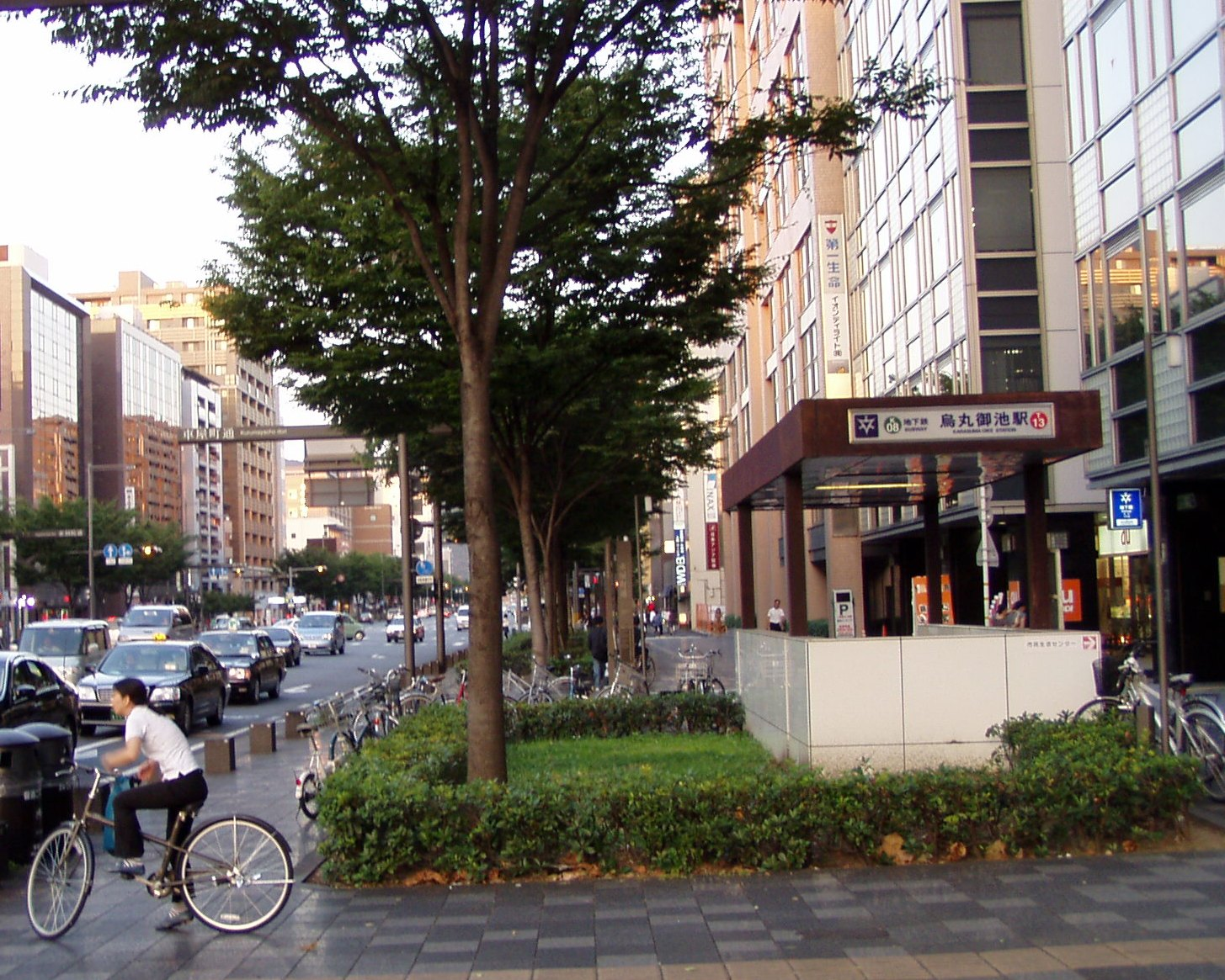 Kyoto. Karasuma-Oike metro station entrance, SE corner.